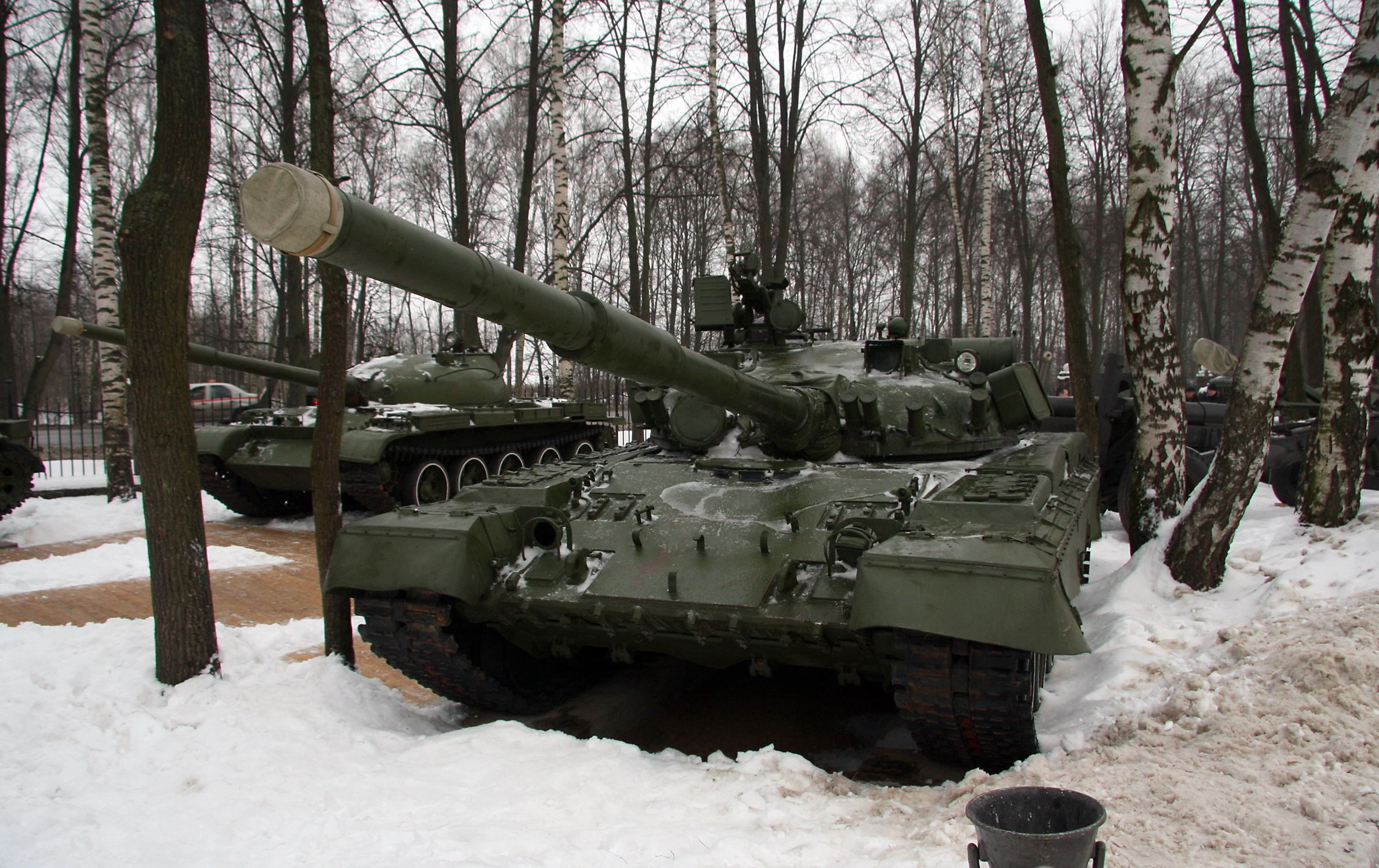 T-80 в музее техники Вадима Задорожного.